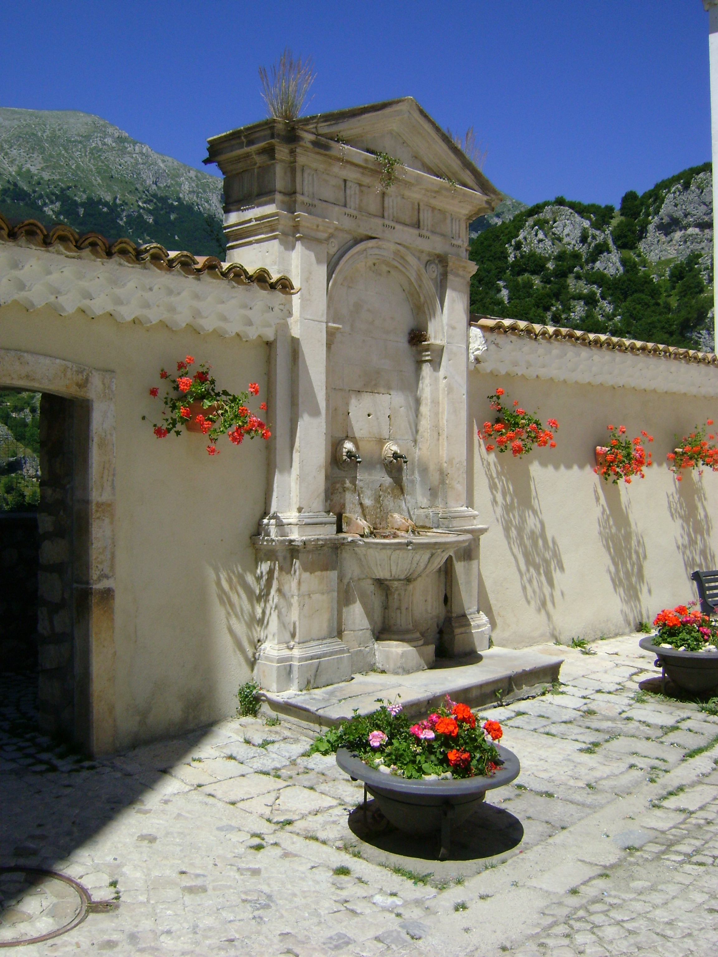 Fontana del centro storico di Barrea, L'Aquila.